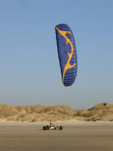 Rennbuggy in Dänemark. Pilot A. Grimm